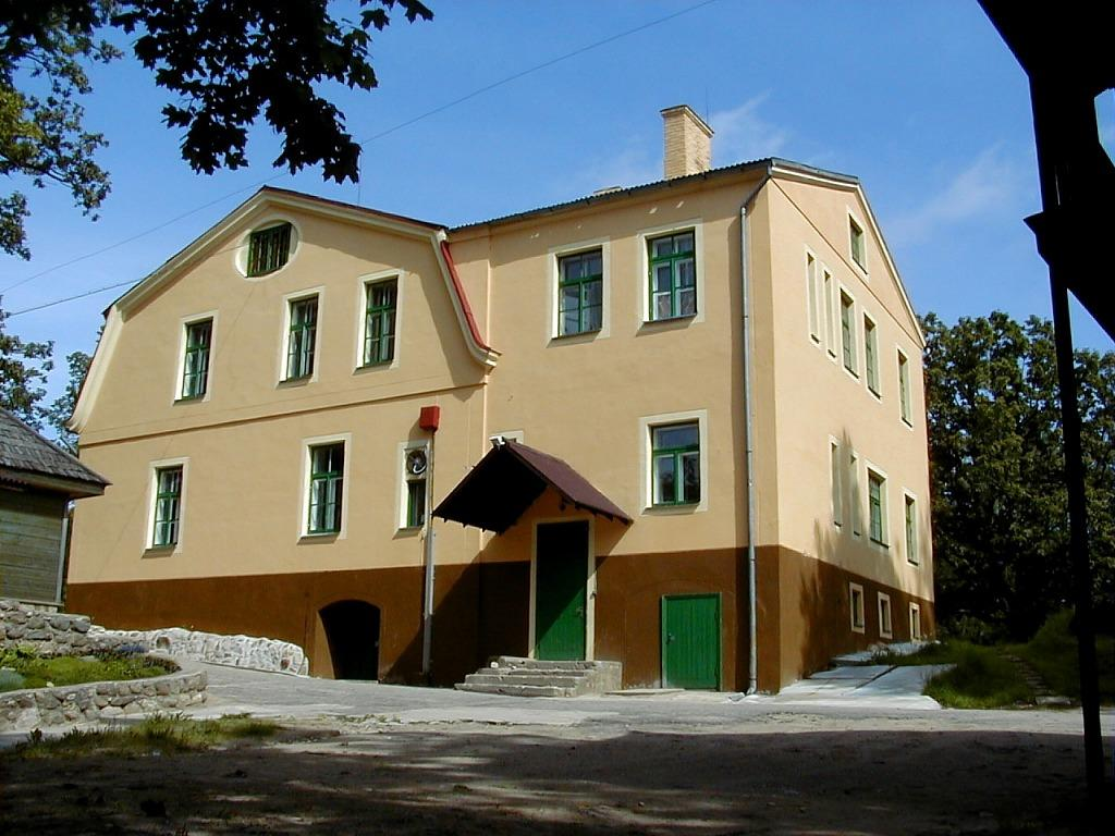 Spāres (Cēsu raj.) muižas pils 2000-08-19